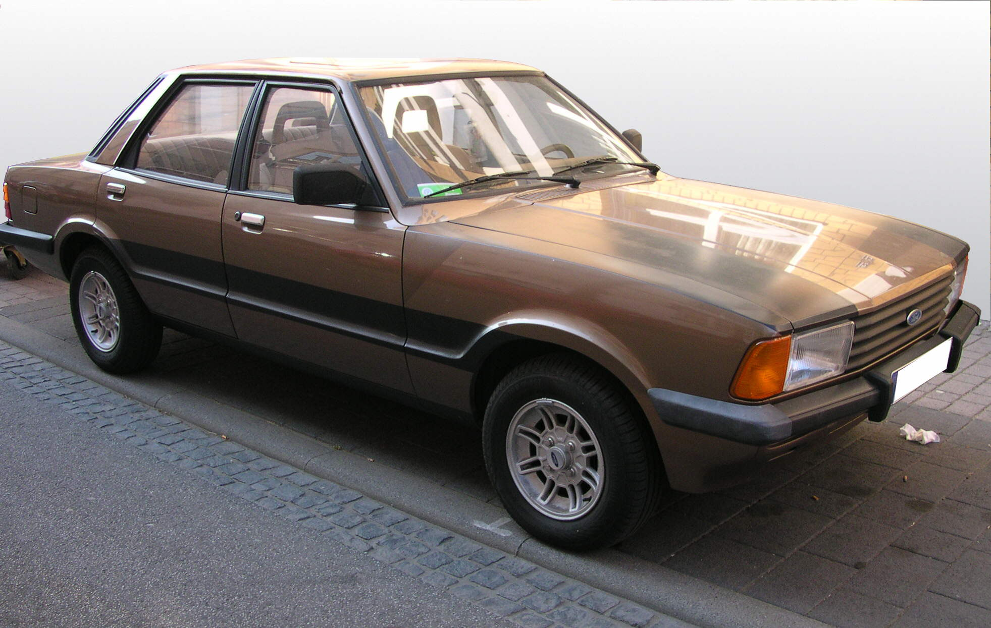 Ford Taunus (ab 1980), 4 Türen, goldmetallic, Alufelgen